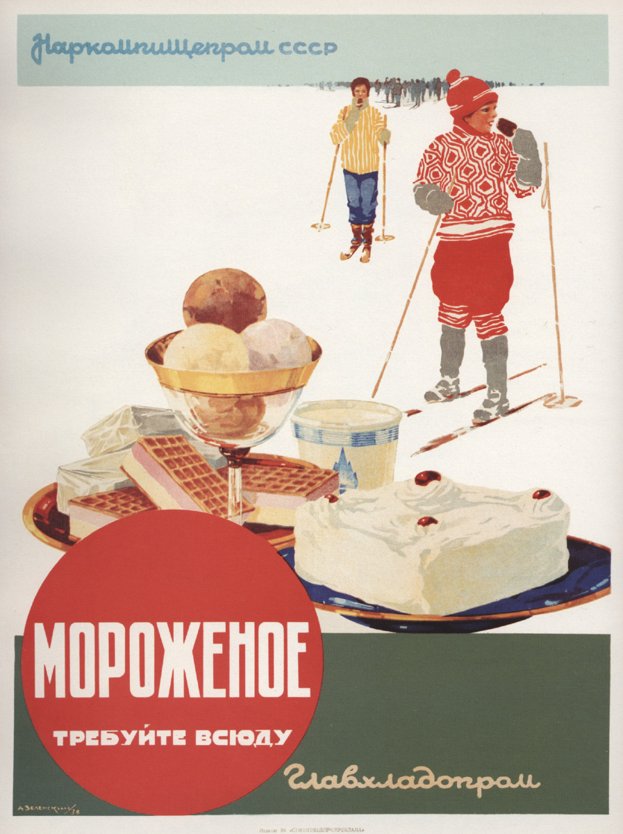 Александр Зеленский. Плакат «Мороженое. Требуйте всюду». 1938, 59x45